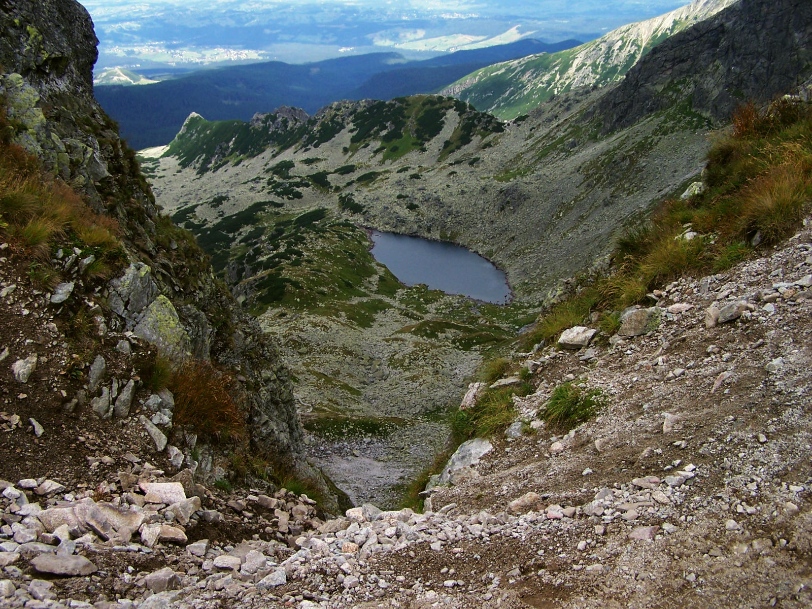 Długi Staw Gąsienicowy